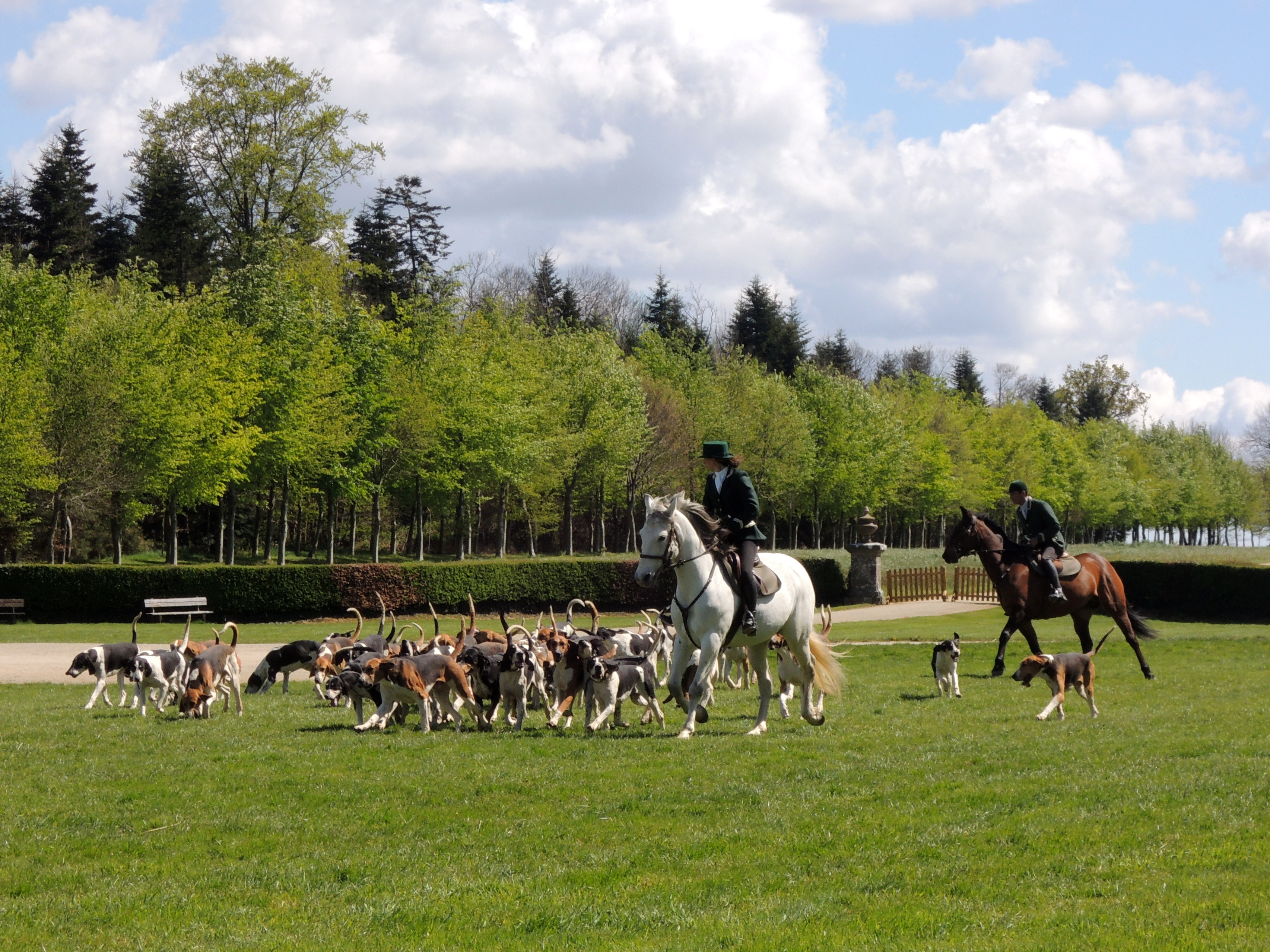 La meute de chiens de La Bourbansais.